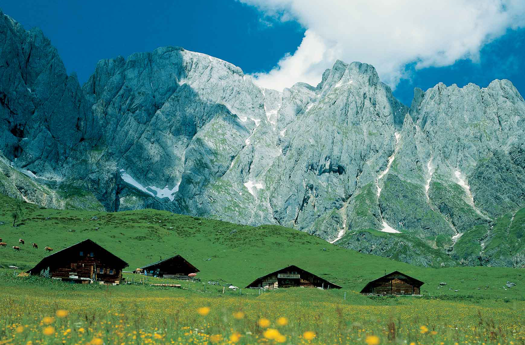 Die Vier Huetten am Fusse des Hochkoenigs - Muehlbach